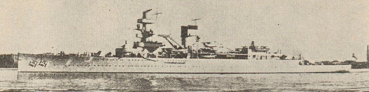 Deze kruiser nam deel aan de Slag in de Javazee op 27 en 28 februari 1942